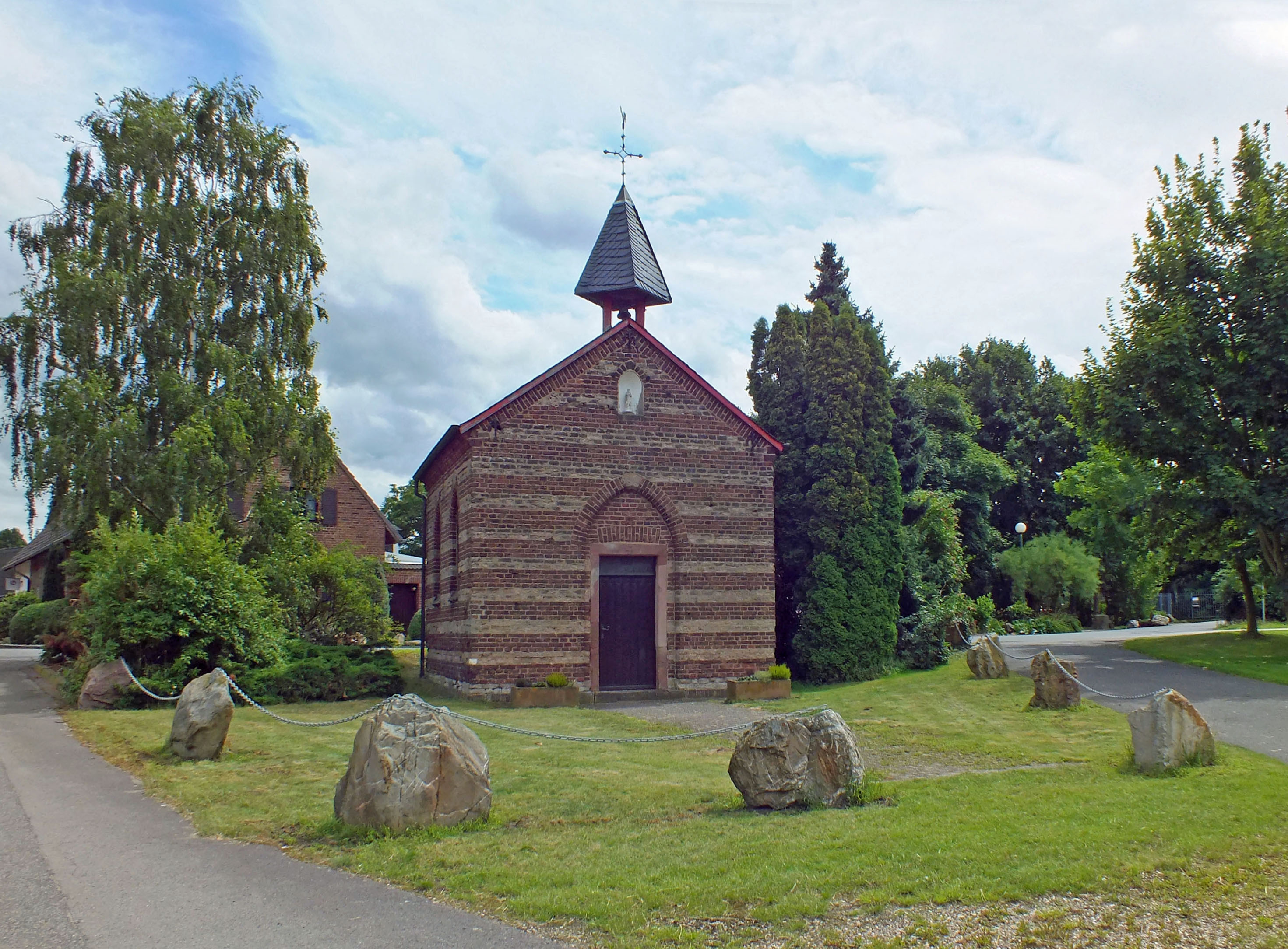 Kapelle Geilrath This is a photograph of an architectural monument.